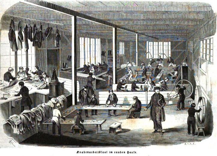 Das rauhe haus zu Horn bei Hamburg. In: Illustrirte Zeitung Nr. 175.